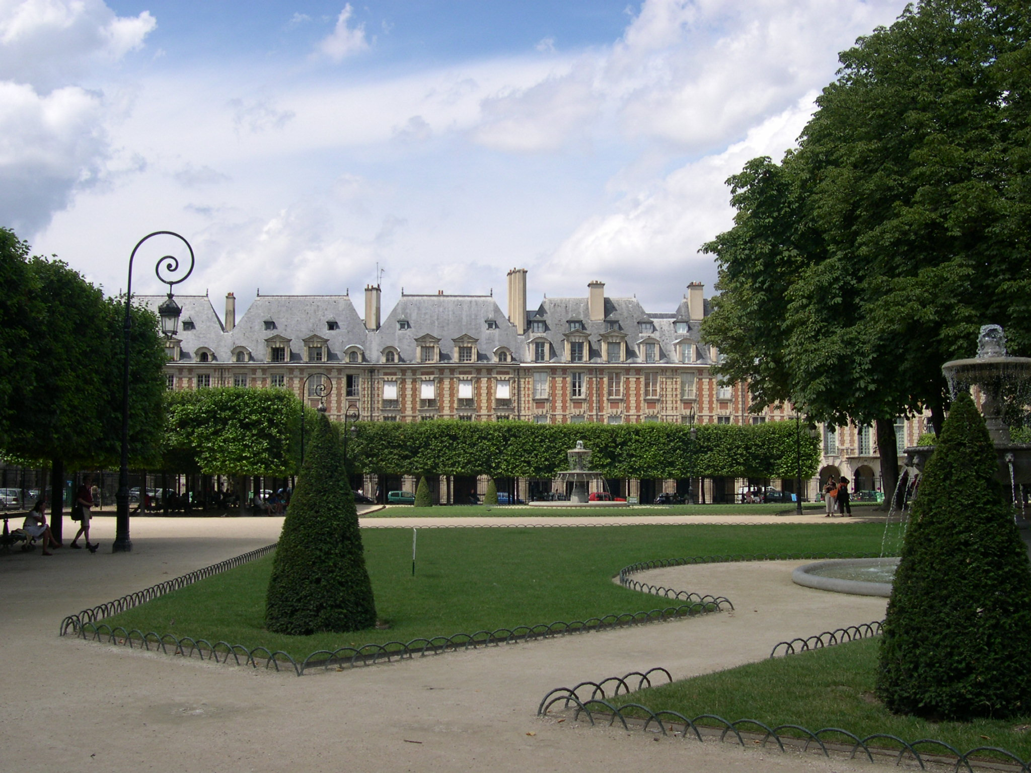 Place des Vosges, Paris, France.